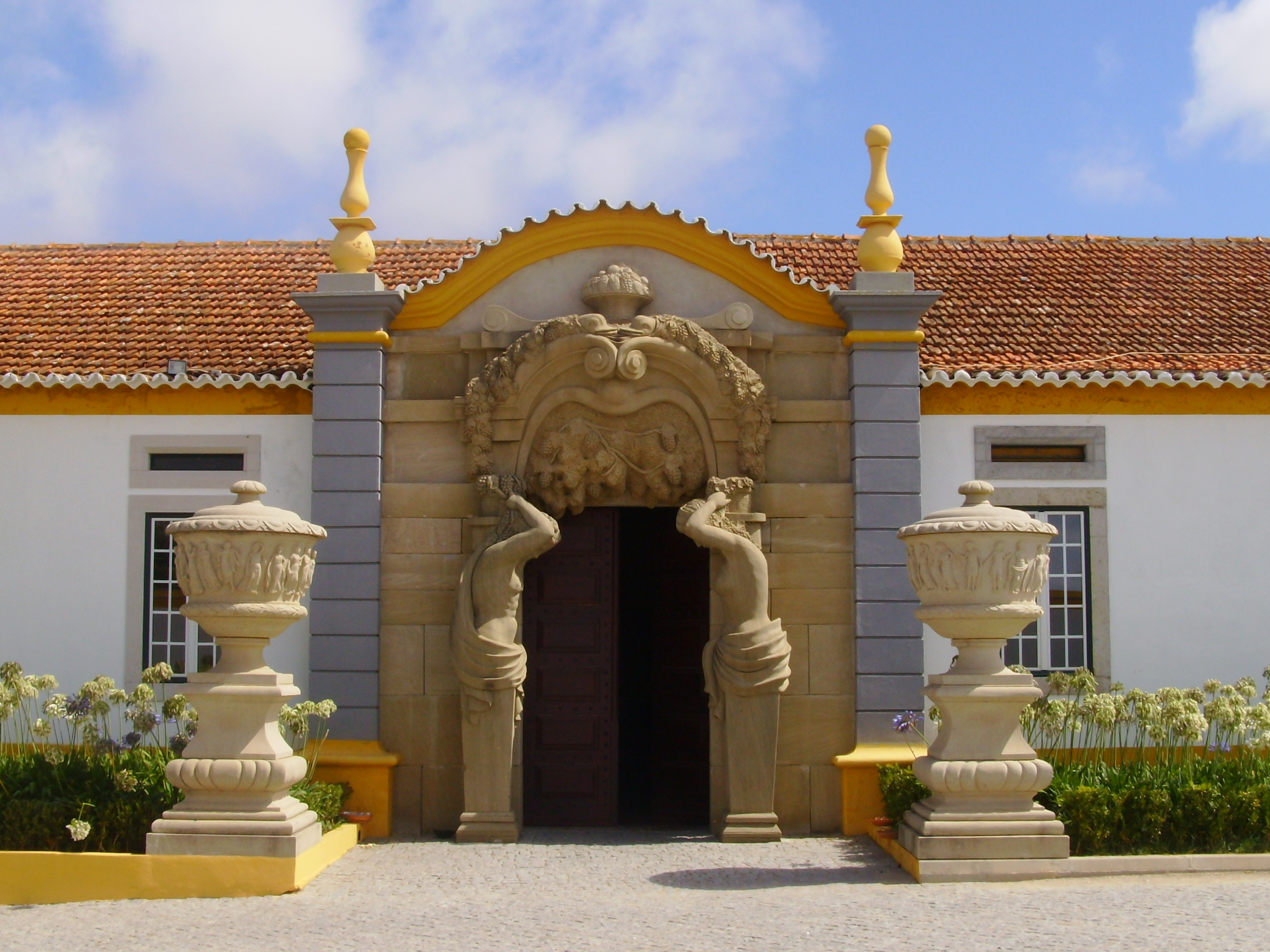 Quinta dos Loridos, freguesia do Carvalhal, concelho do Bombarral, distrito de Leiria, Portugal: portal "Paladiano".